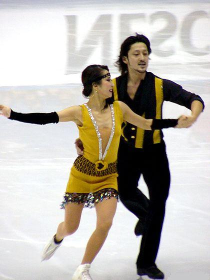 Nakako Tsuzuki and Kenji Miyamoto at the 2004 NHK Trophy.